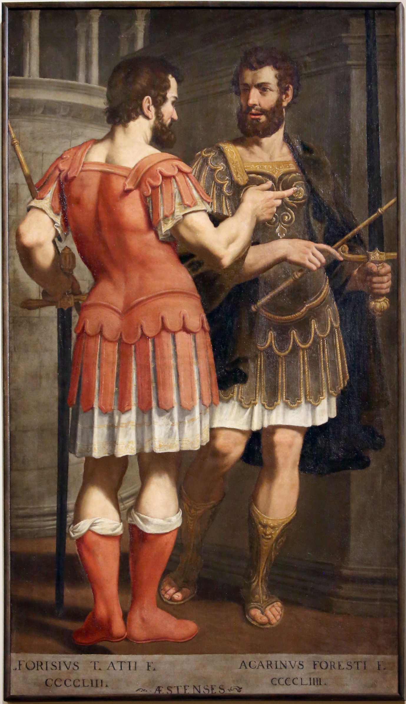 Palazzo dei Musei (Modena) This is a photo of a monument which is part of cultural heritage of Italy.